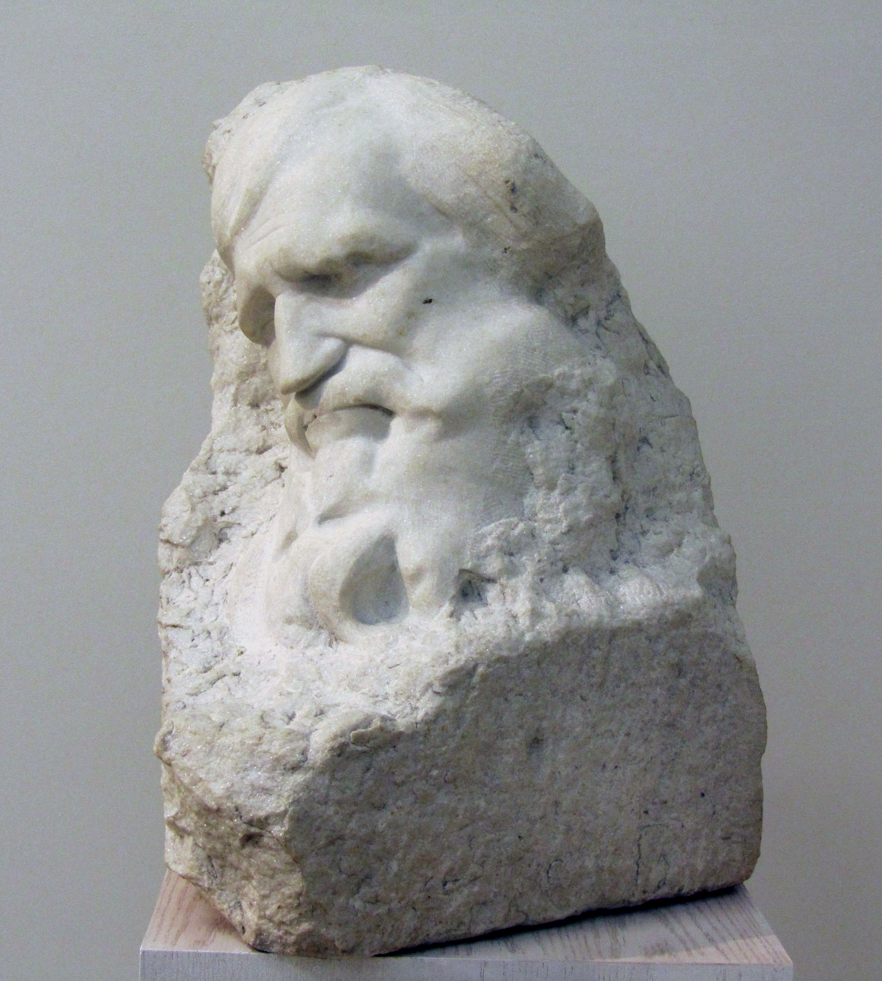 Palacio Mikhailovsky (Museo Ruso) San Petersburgo. Rusia Escultura el Pensador (1898 por Sergey Konenkov